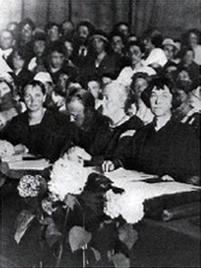 클라라 제트킨과 알렉산드라 콜론타이